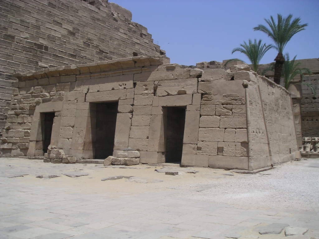 Chapelle reposoir des barques sacrées de Séthi II à Karnak - XIXe dynastie égyptienne